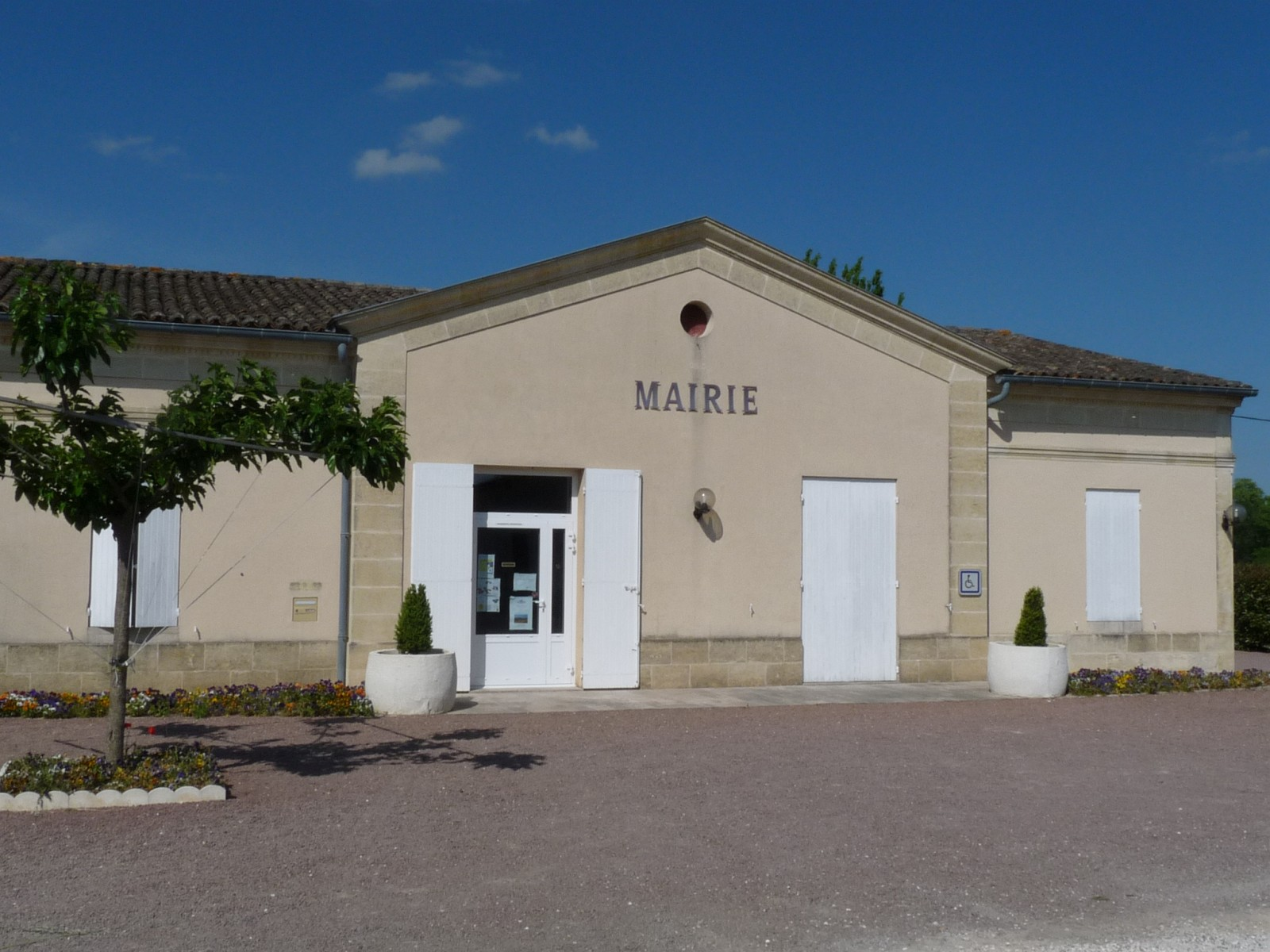 Mairie de Néac, Gironde, France